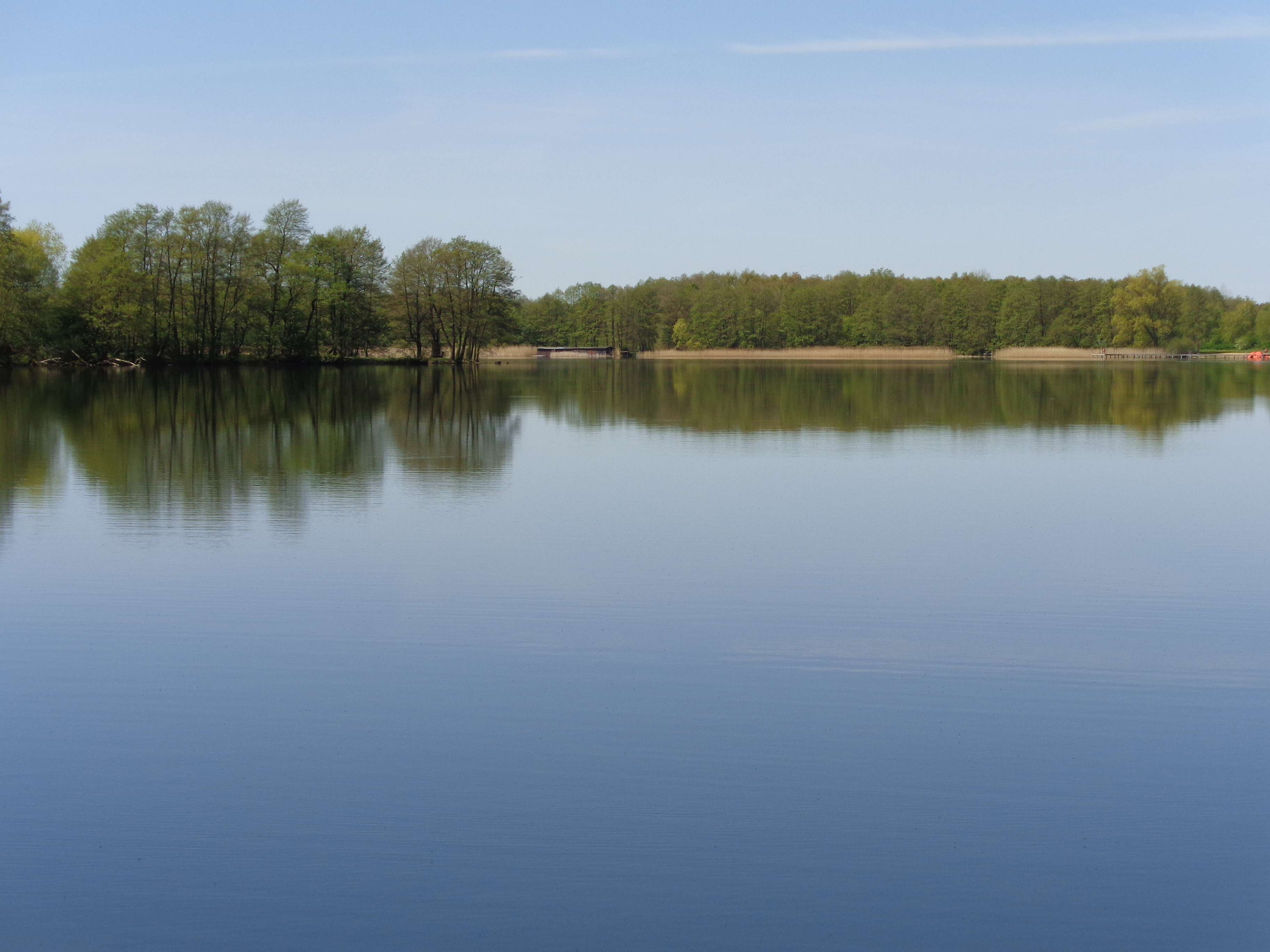 Nordende des Kritzower Sees bei Ausbau Barkow.